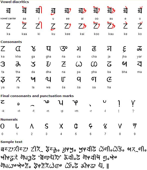 limbu script subba era